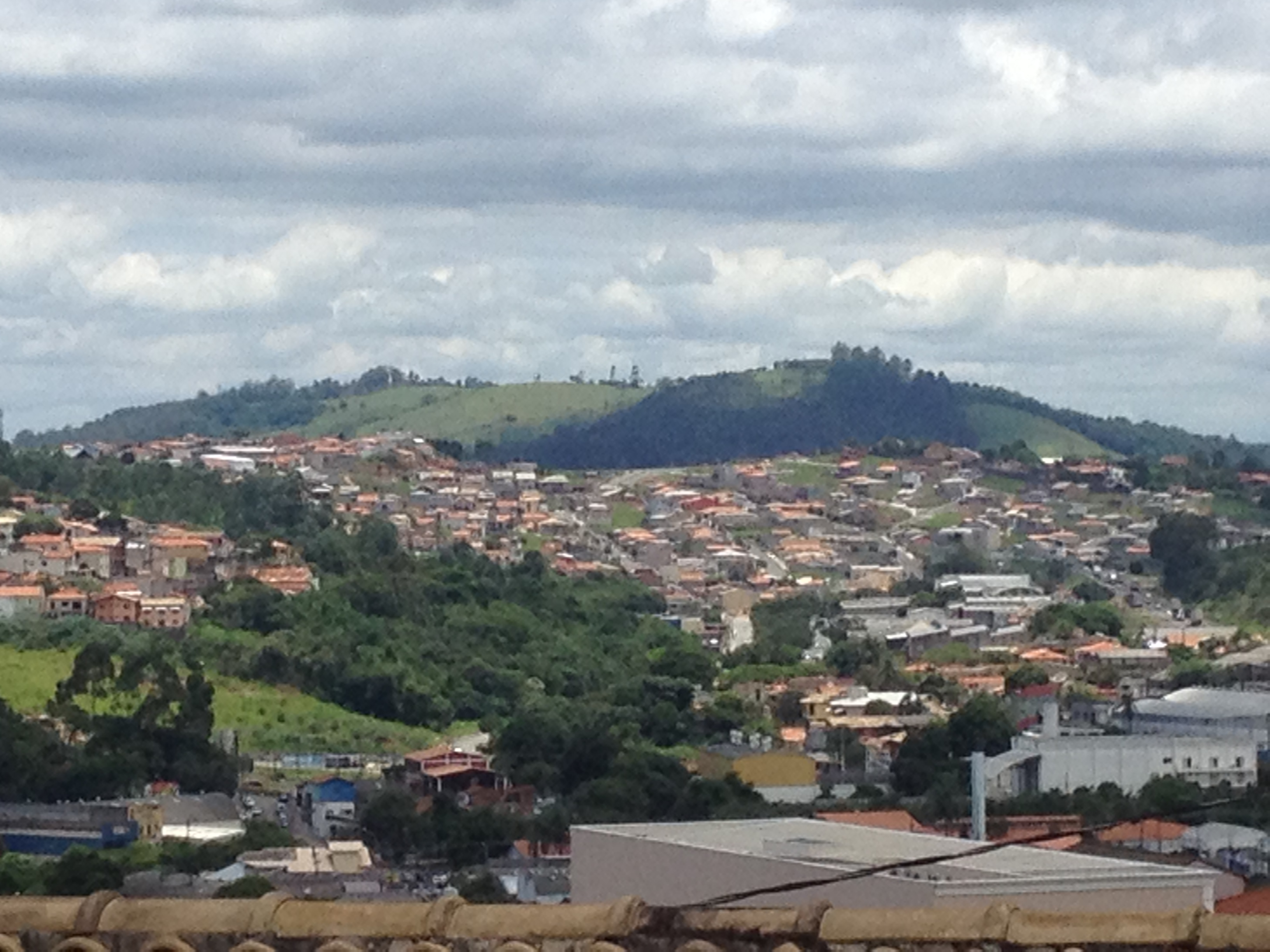 Vista de Itatiba, município do interior de São Paulo